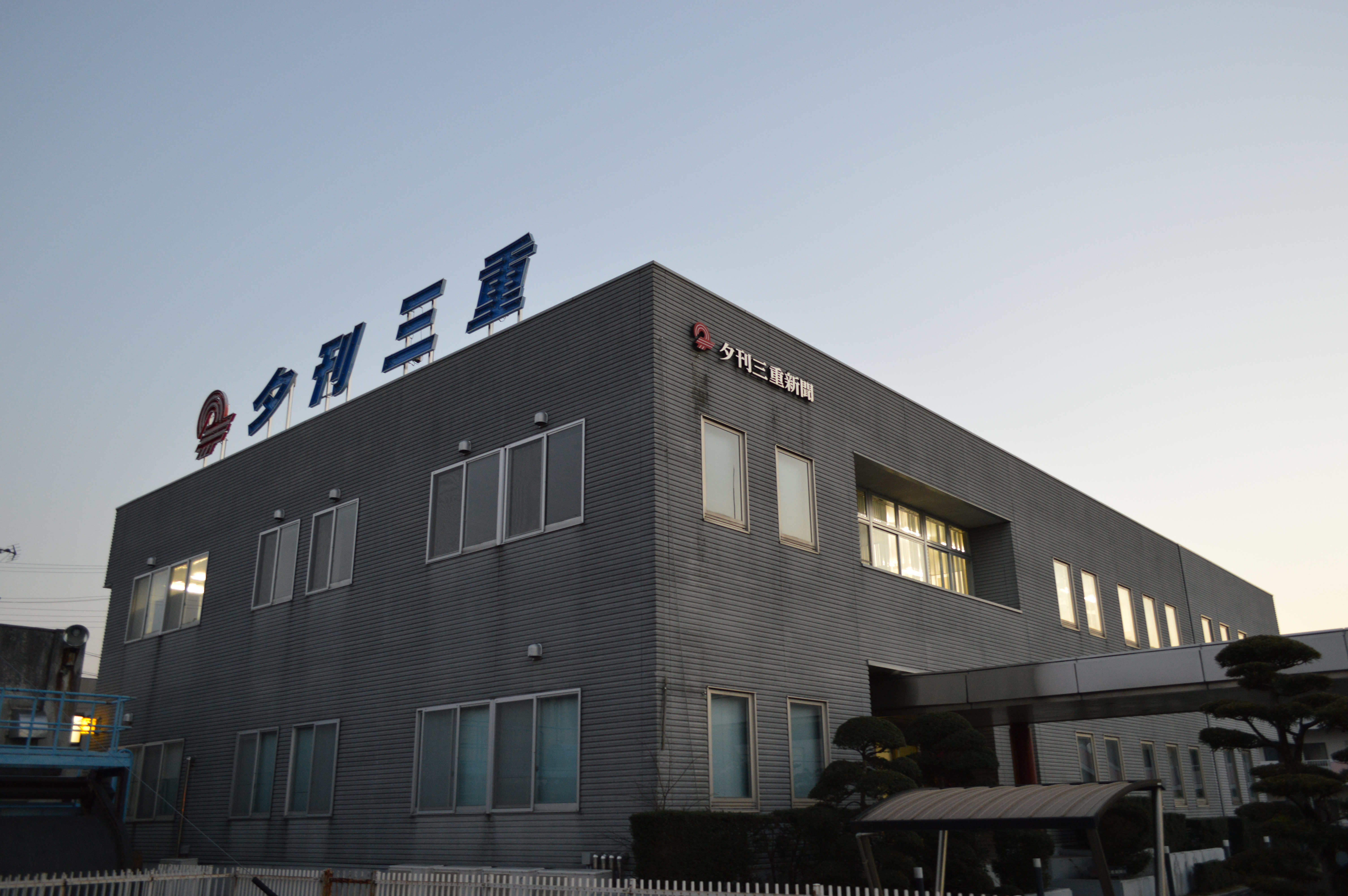 三重県松阪市にある夕刊三重新聞社。